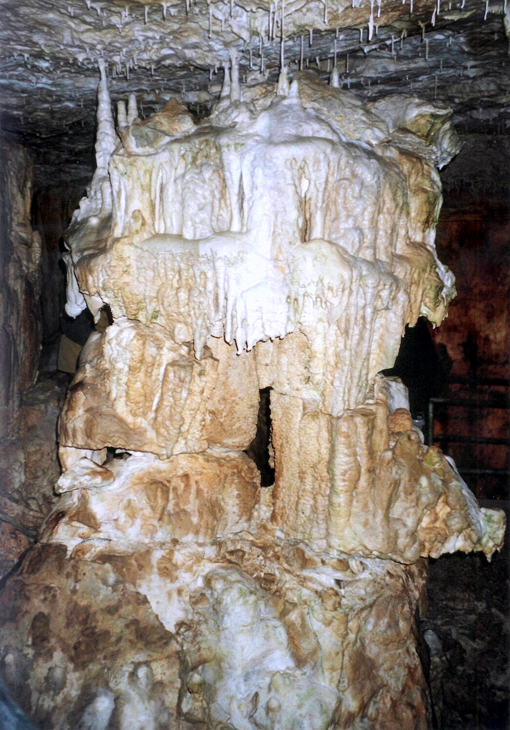 König-Otto-Tropfsteinhöhle, Germany